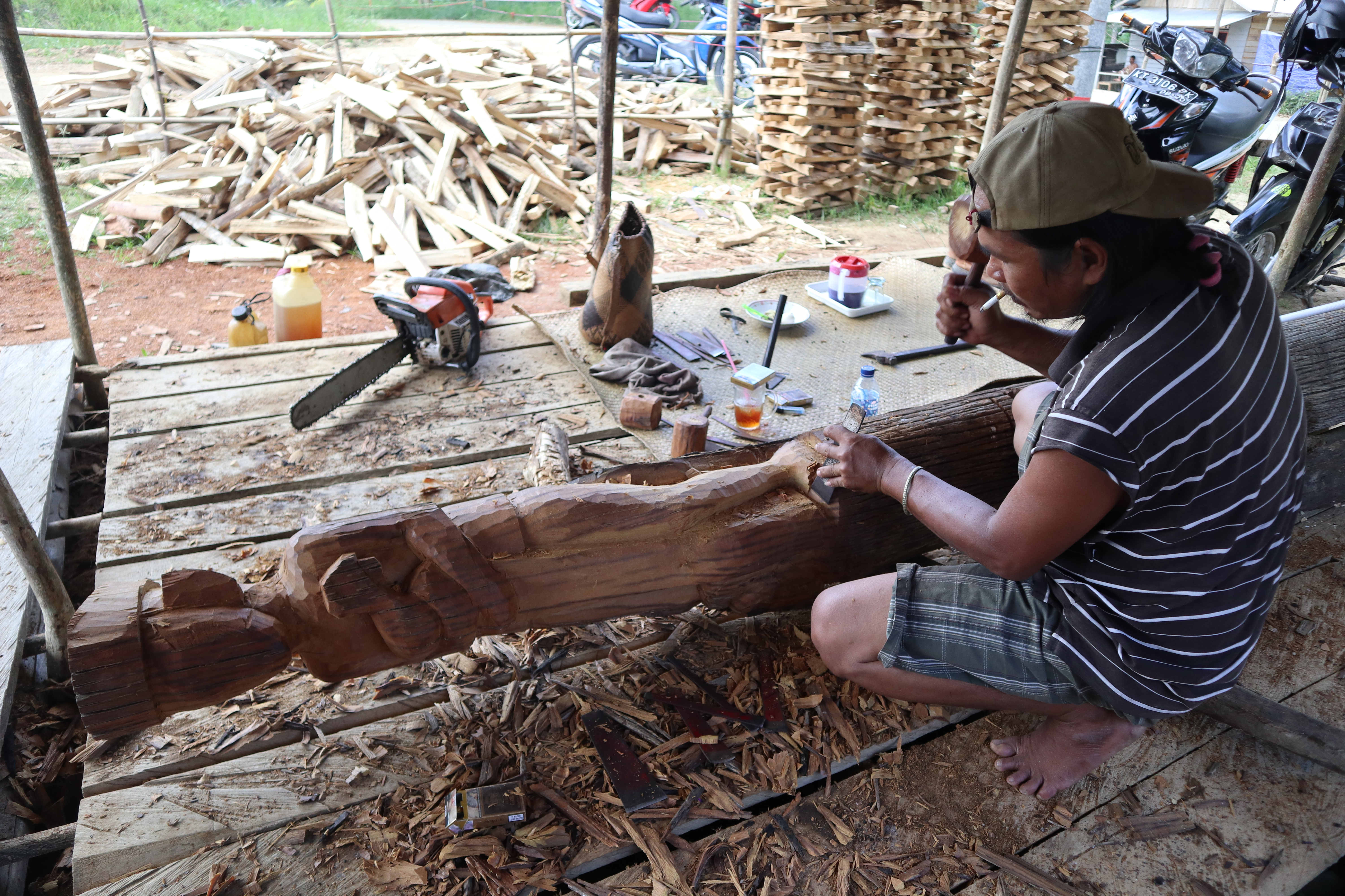 Proses mengukir kayu untuk dijadikan patung blontakng.